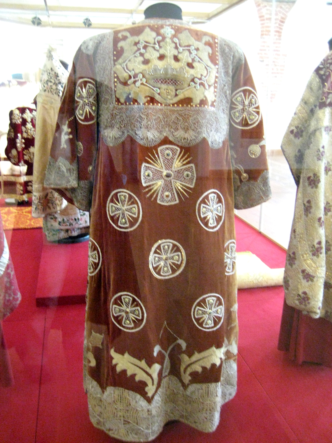 Богослужебное облачение - стихарь. Музей Кирилло-Белозерского монастыря